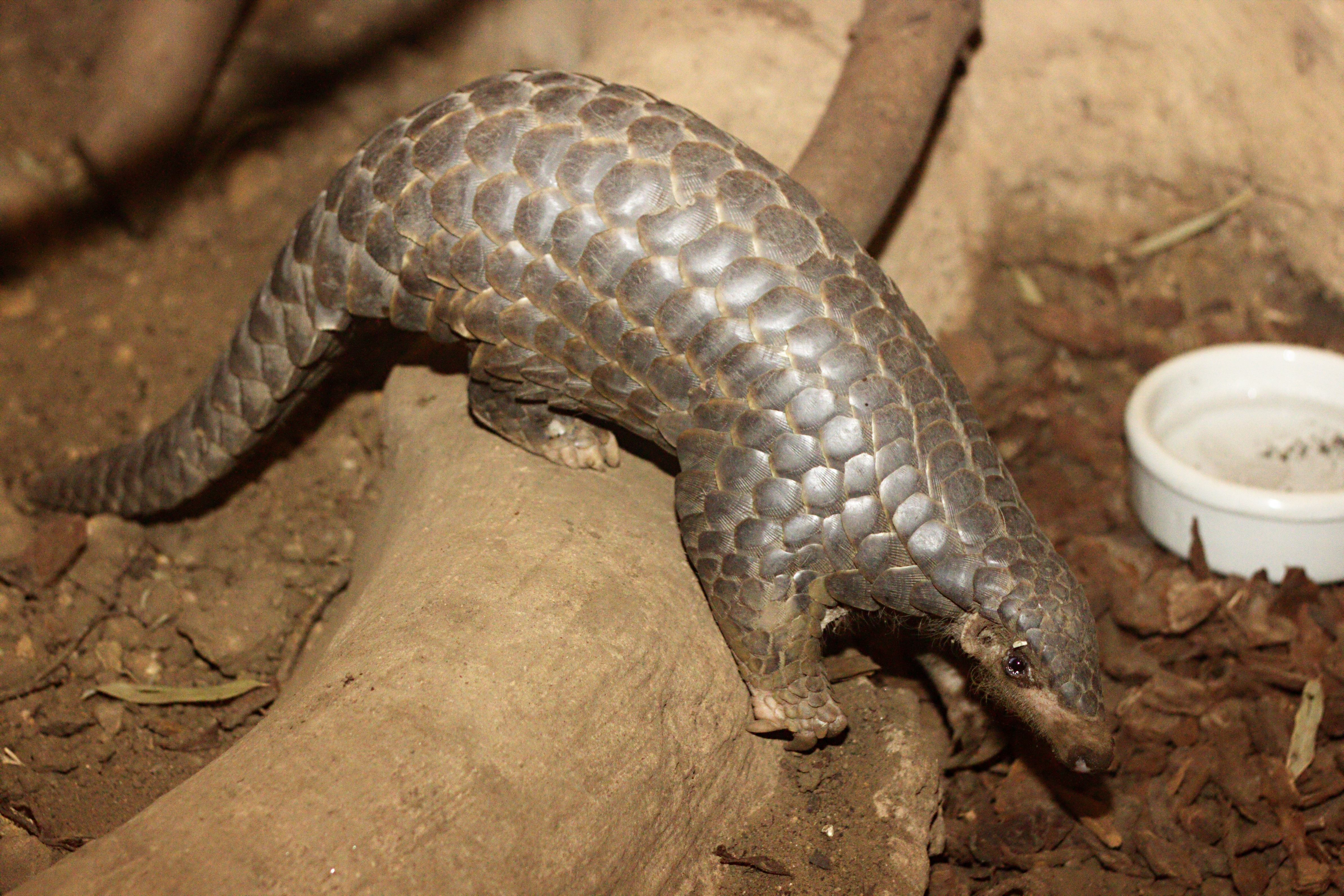 Chinesisches Ohrenschuppentier "Tou Feng" im Zoo Leipzig